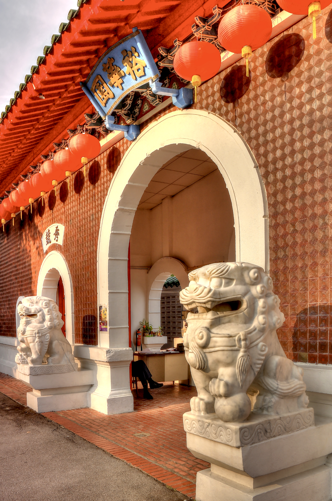 Chinese Gardens